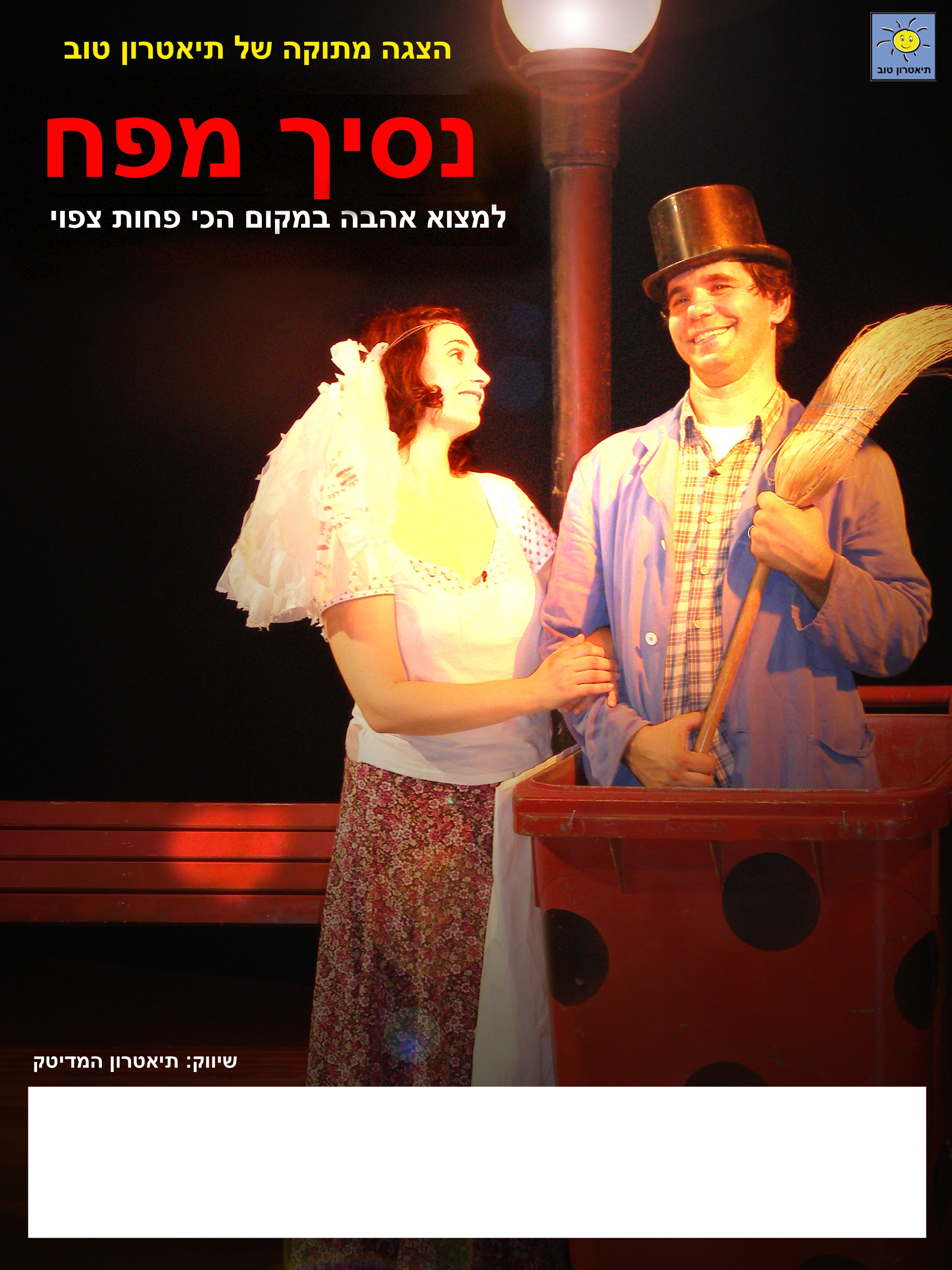 8 פוסטר של נסיך מפח (בתמונה לובה וחנוך רעים)